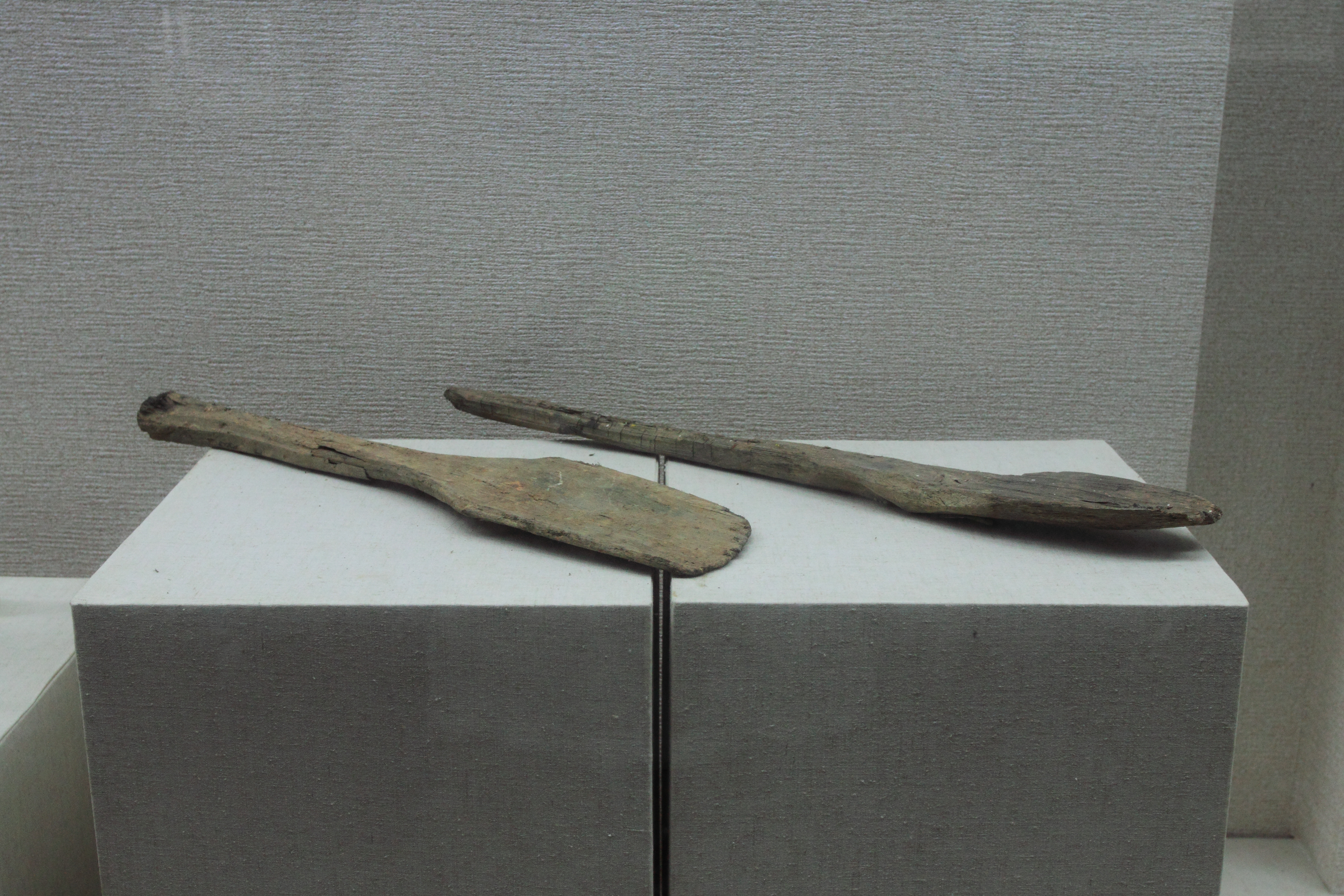 江西省博物馆（位于中国江西省南昌市）藏品——木铲，瑞昌铜岭铜矿遗址出土。